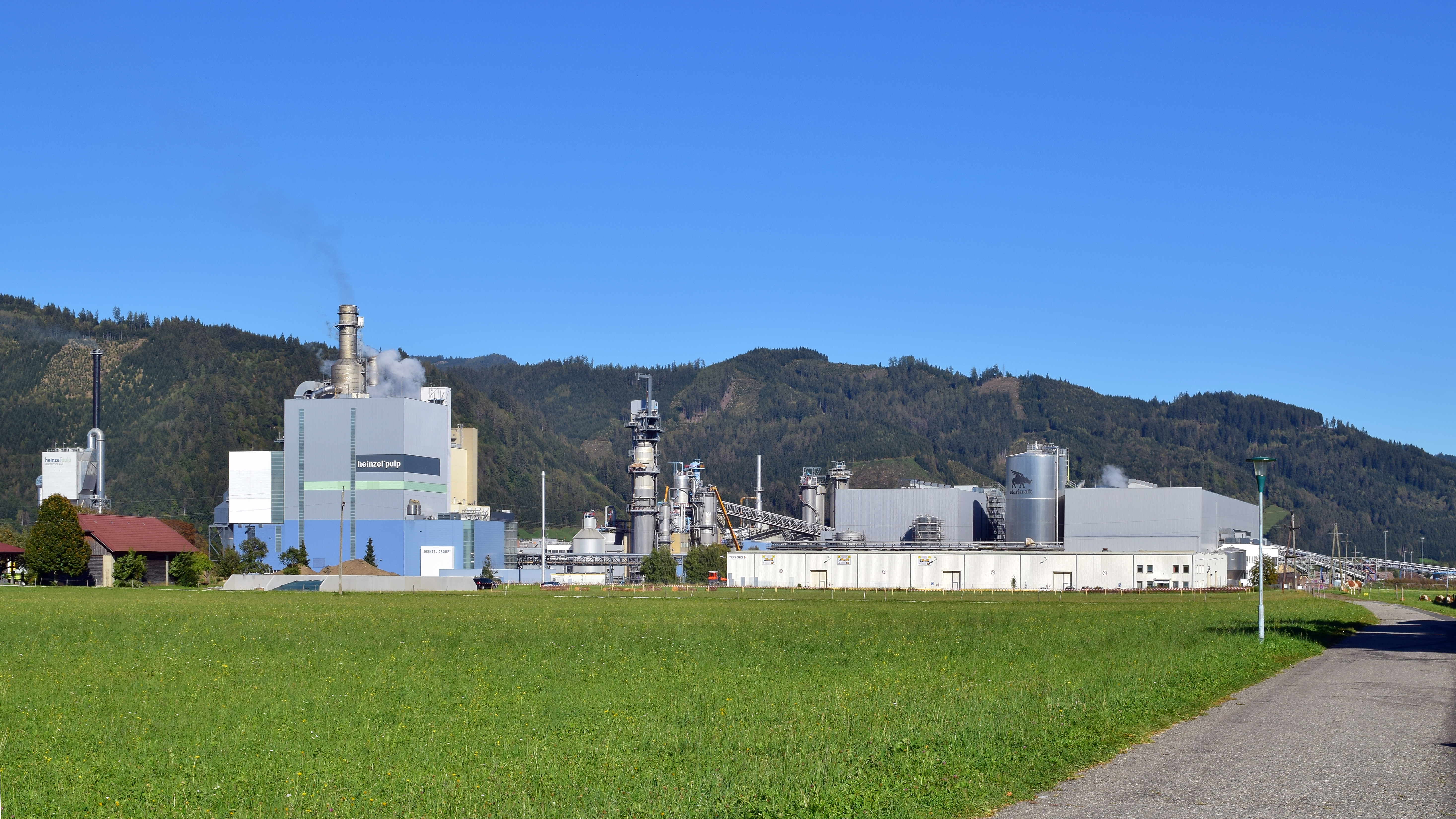 Zellstoff Pöls AG vom Friedhof aus gesehen